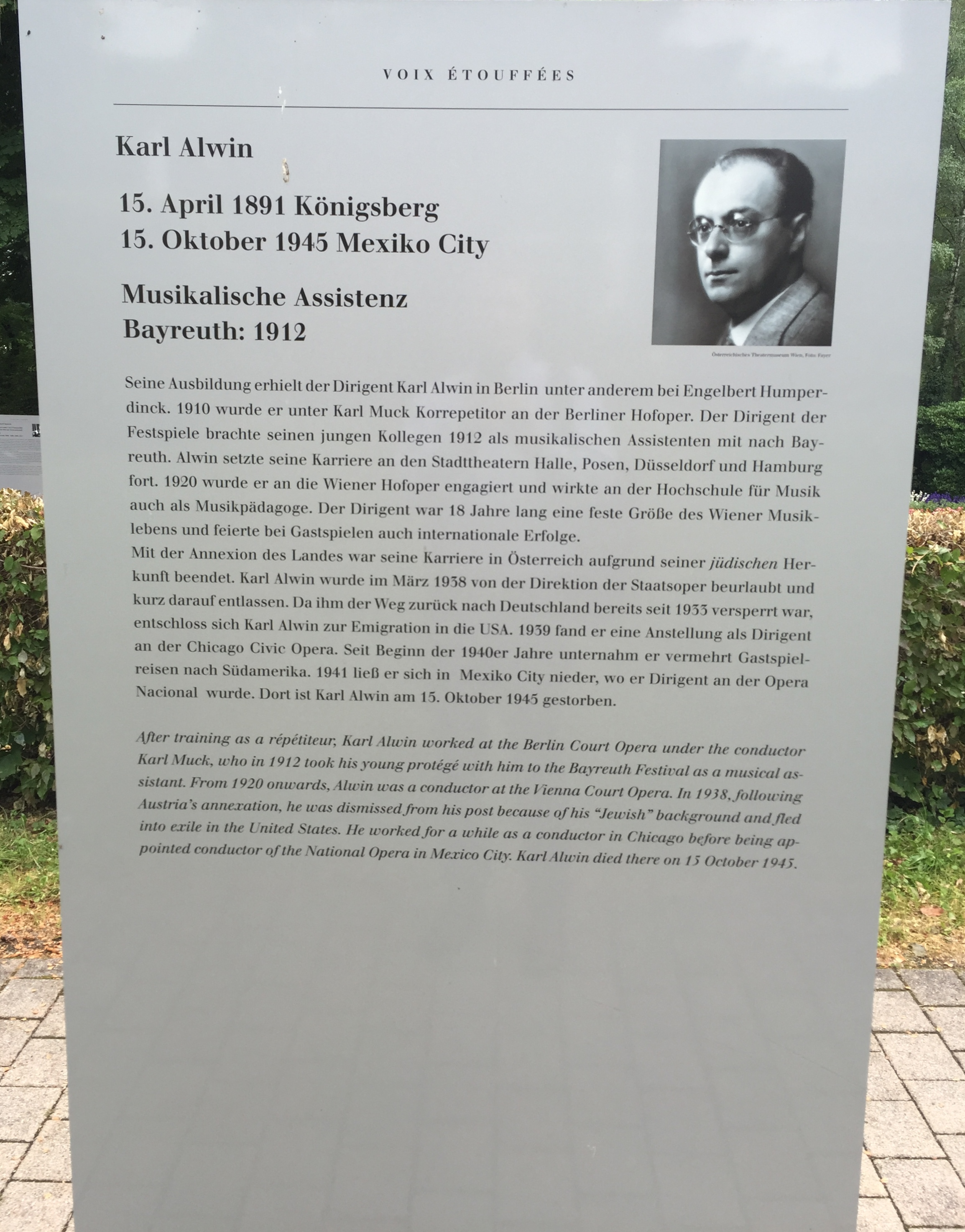 "Verstummte Stimmen - Die Bayreuther Festspiele und die 'Juden' 1876 bis 1945", Ausstellung 2016